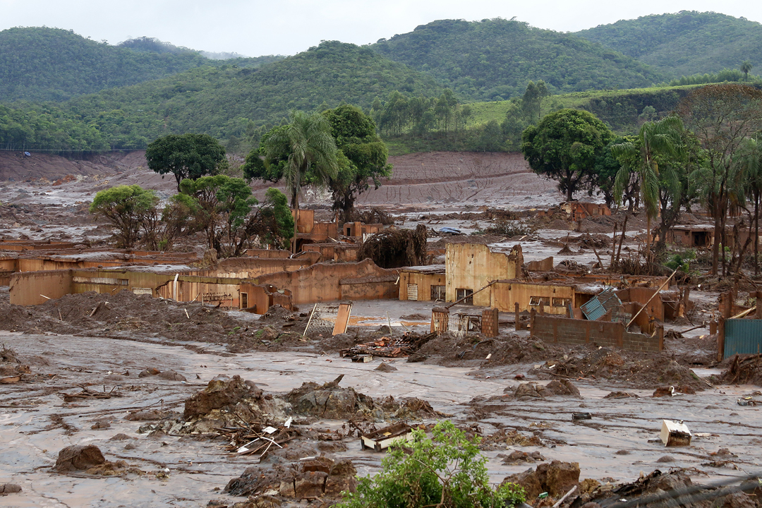 O rompimento da barragem de rejeitos da mineradora Samarco, cujos donos são a Vale a anglo-australiana BHP, causou uma enxurrada de lama que inundou várias casas no distrito de Bento Rodrigues, em Mariana, na Região Central de Minas Gerais. Inicialmente, a mineradora havia afirmado que duas barragens haviam se rompido, de Fundão e Santarém. No dia 16 de novembro, a Samarco confirmou que apenas a barragem de Fundão se rompeu. Local: Distrito de Bento Rodrigues, Município de Mariana, Minas Gerais. Foto: Rogério Alves/TV Senado